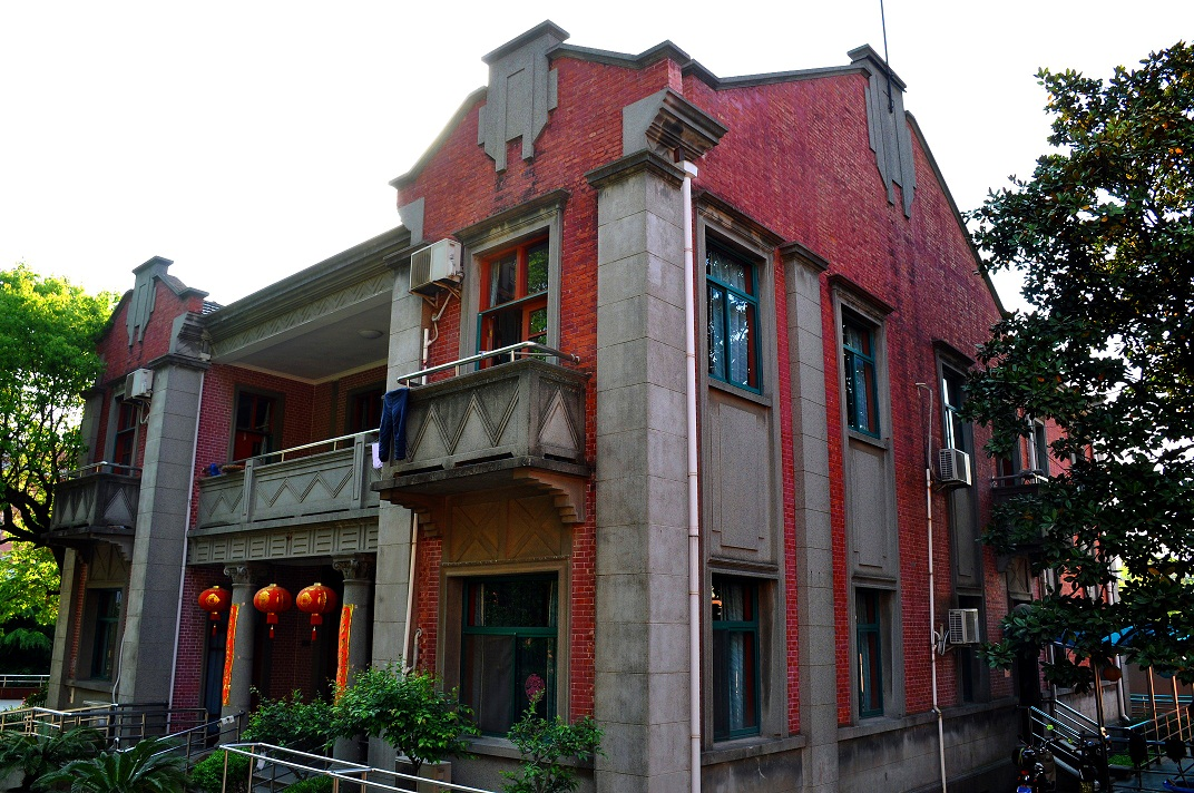 康锡涛住宅 三林塘古镇长清路2315号